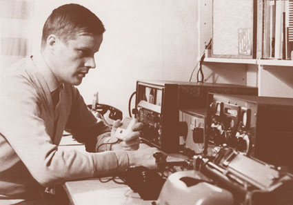 Suomalainen viestinnän professori, toimittaja ja kansanedustaja Osmo A. Wiio (1928-2013) vuonna 1961.